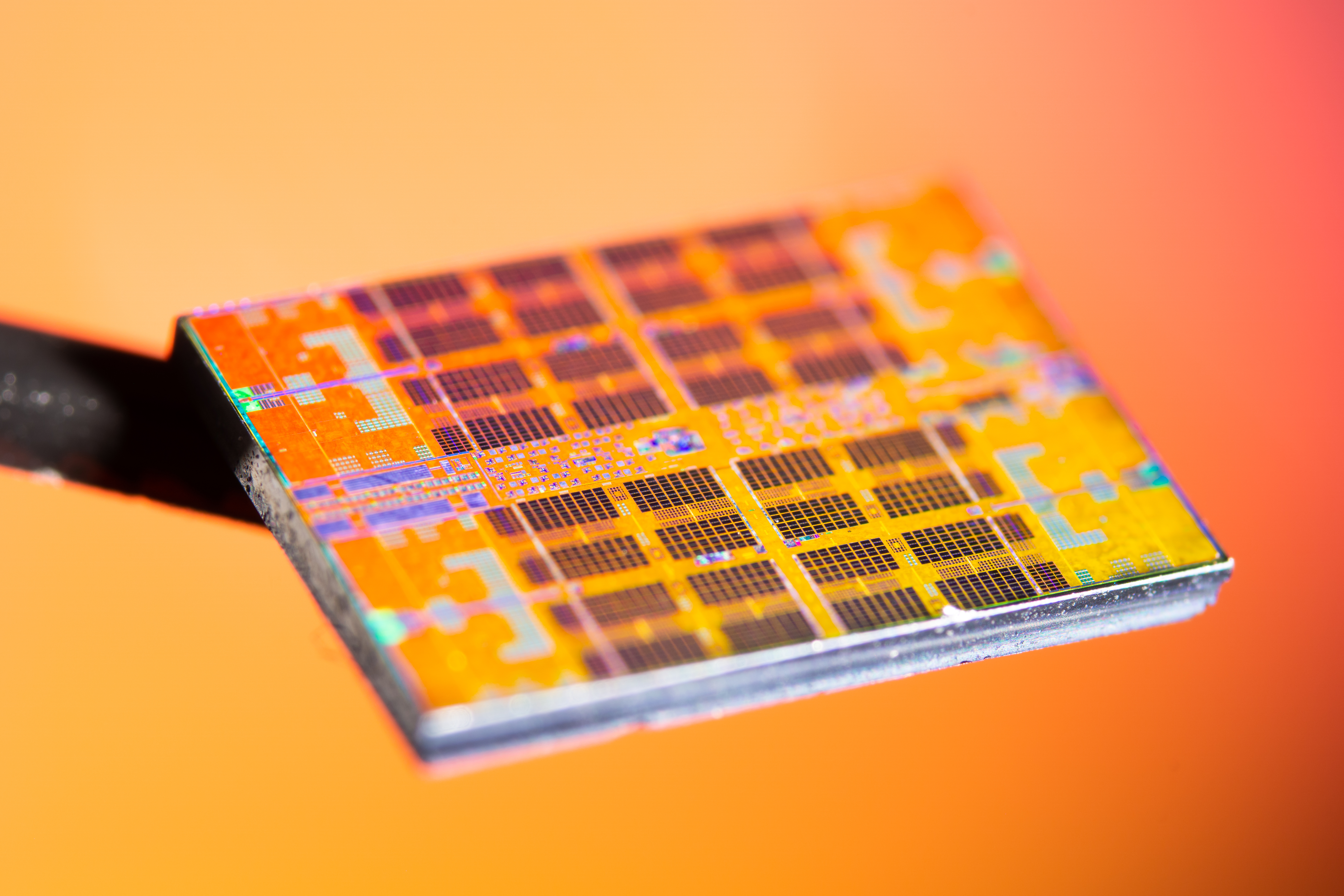 AMD Ryzen 5 3600 (Zen 2 | Matisse | CCD)